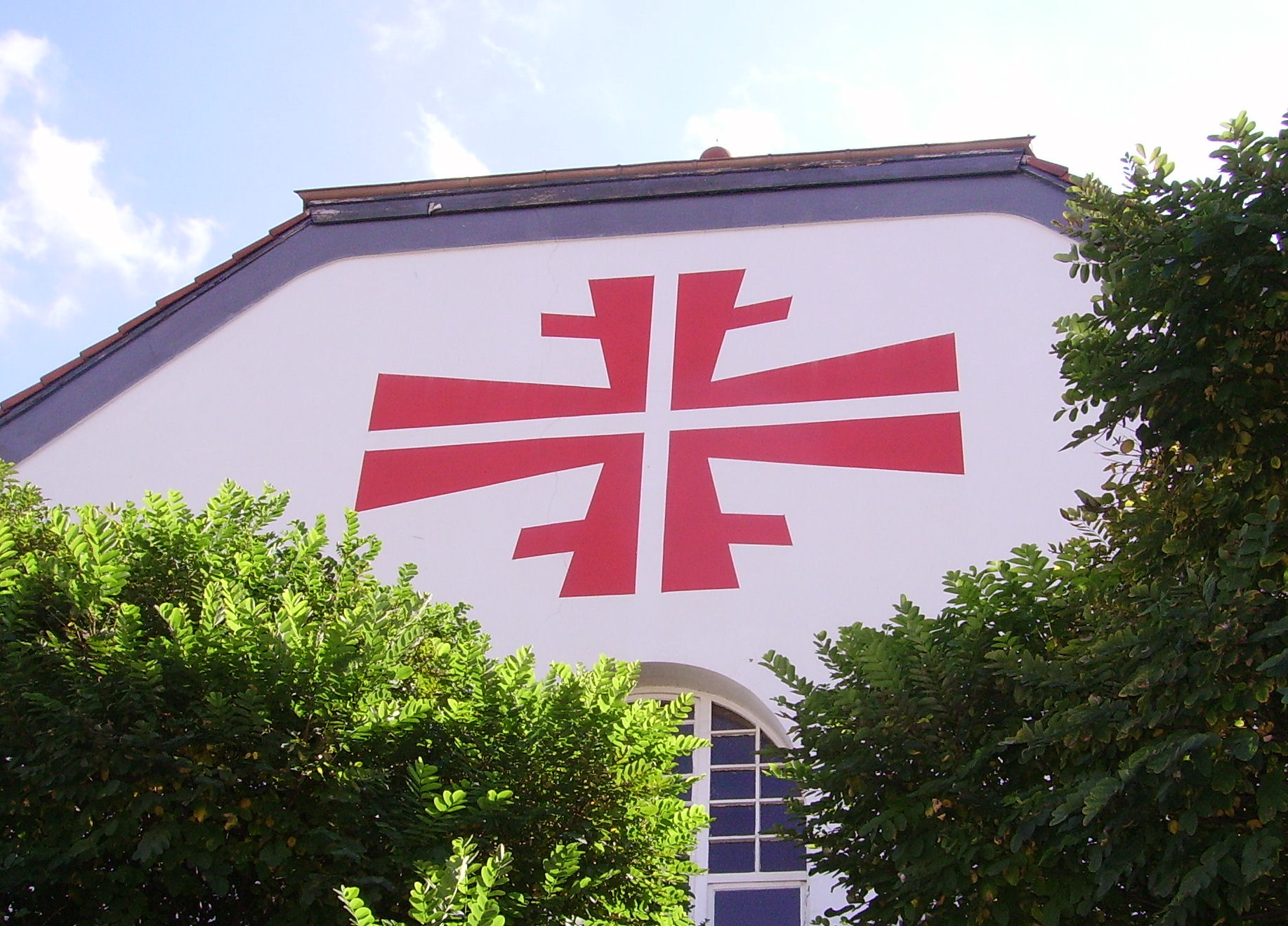 Frisch, fromm, fröhlich, frei in Eisenberg (Pfalz), Germany